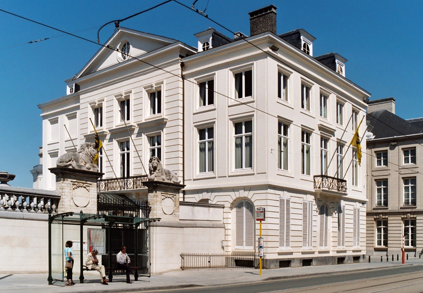 Belgique - Bruxelles - Hôtel Errera